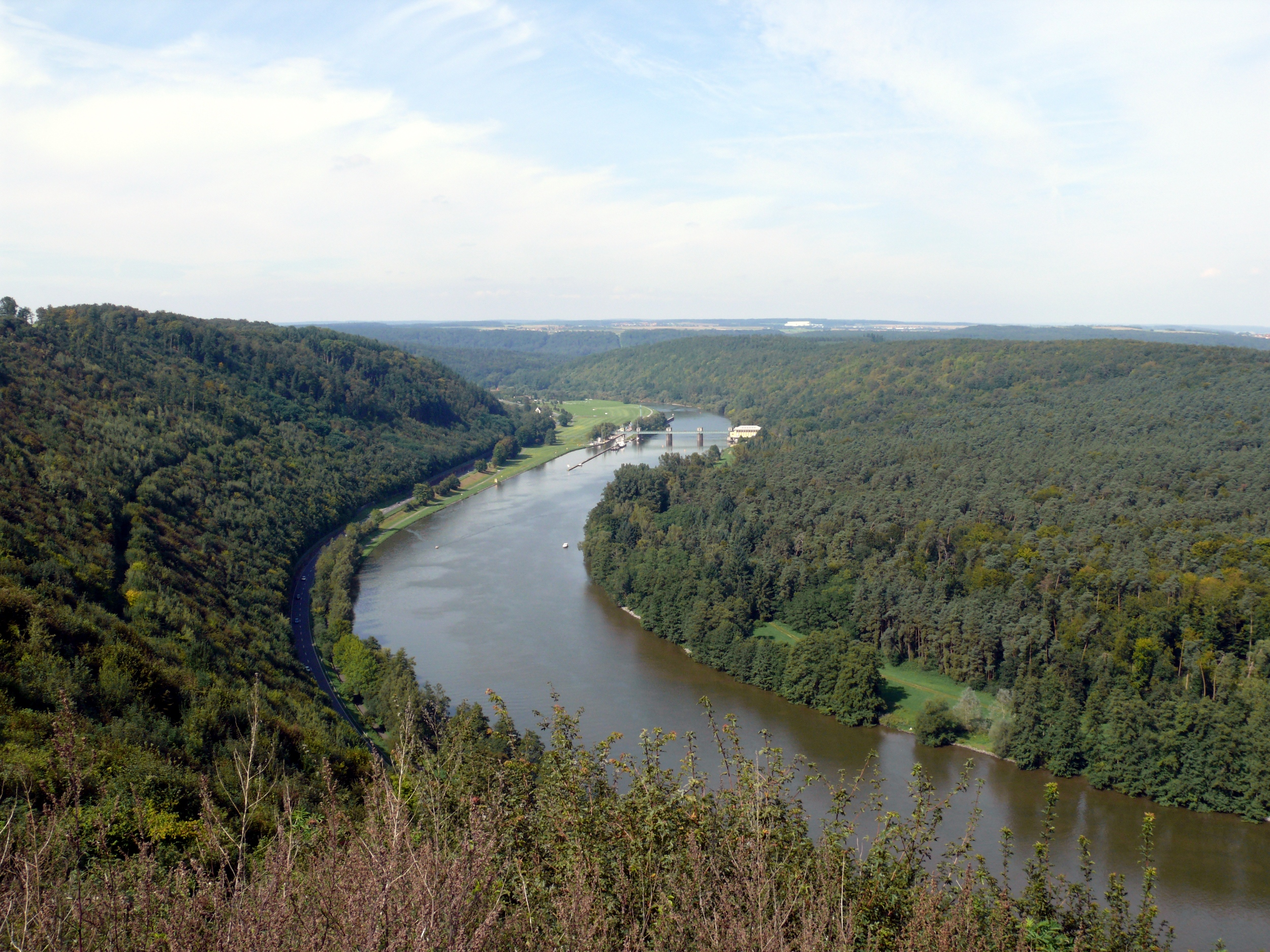 Der Main zwischen Urphar und Wertheim, Blick nach Norden